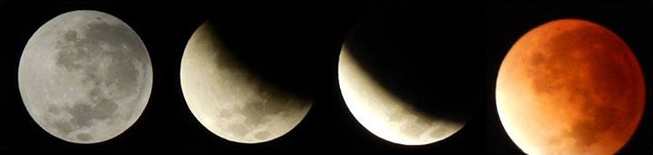 Fotos tomada desde Montevideo, por Lourdes Alaníz